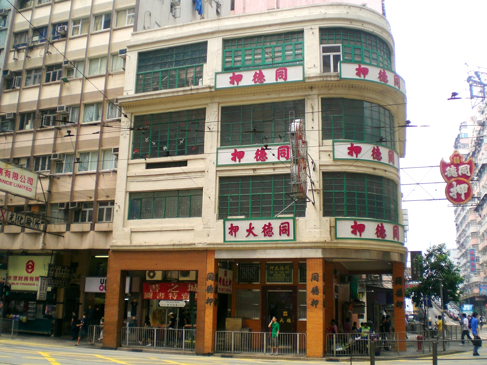 典當業, 唐樓, 商店, 軒尼詩道